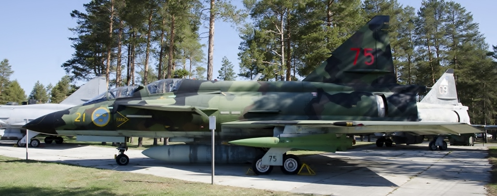 SK 37E Viggen vid Flygmuseet F 21 i Luleå. Flygplanet levererades som SK 37 till Flygvapnet år 1976, och tjänstgjorde från samma år som utbildningsflygplan vid F 15 i Söderhamn. År 1997 överfördes individen till F 16 i Uppsala, och 2003 till F 4 i Östersund. År 2004 överfördes flygplanet till F 21 i Luleå, där det tjänstgjorde som "F 21-75". År 2000 modifierades individen till SK 37E, i syfte att ersätta J 32E som störflygplan. Flygplanet togs ur tjänst år 2005.